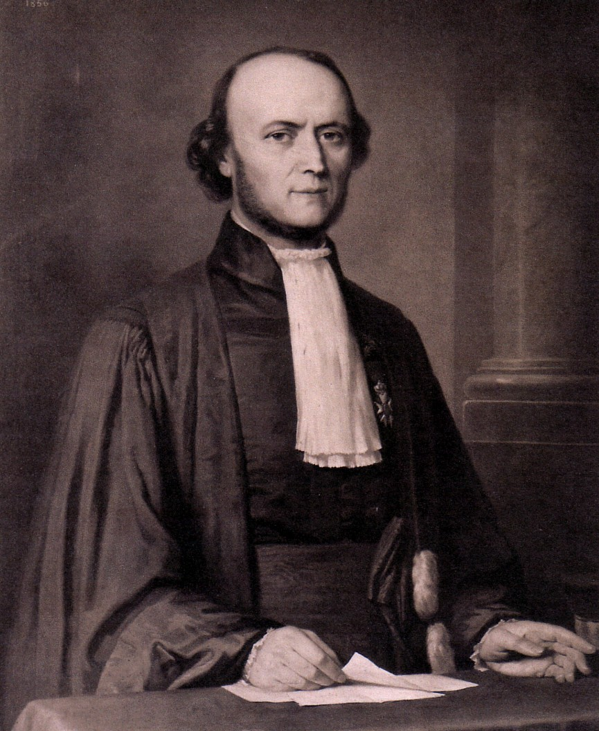 Professeur de médecine, Directeur Hôtel Dieu (Lyon), écrivain